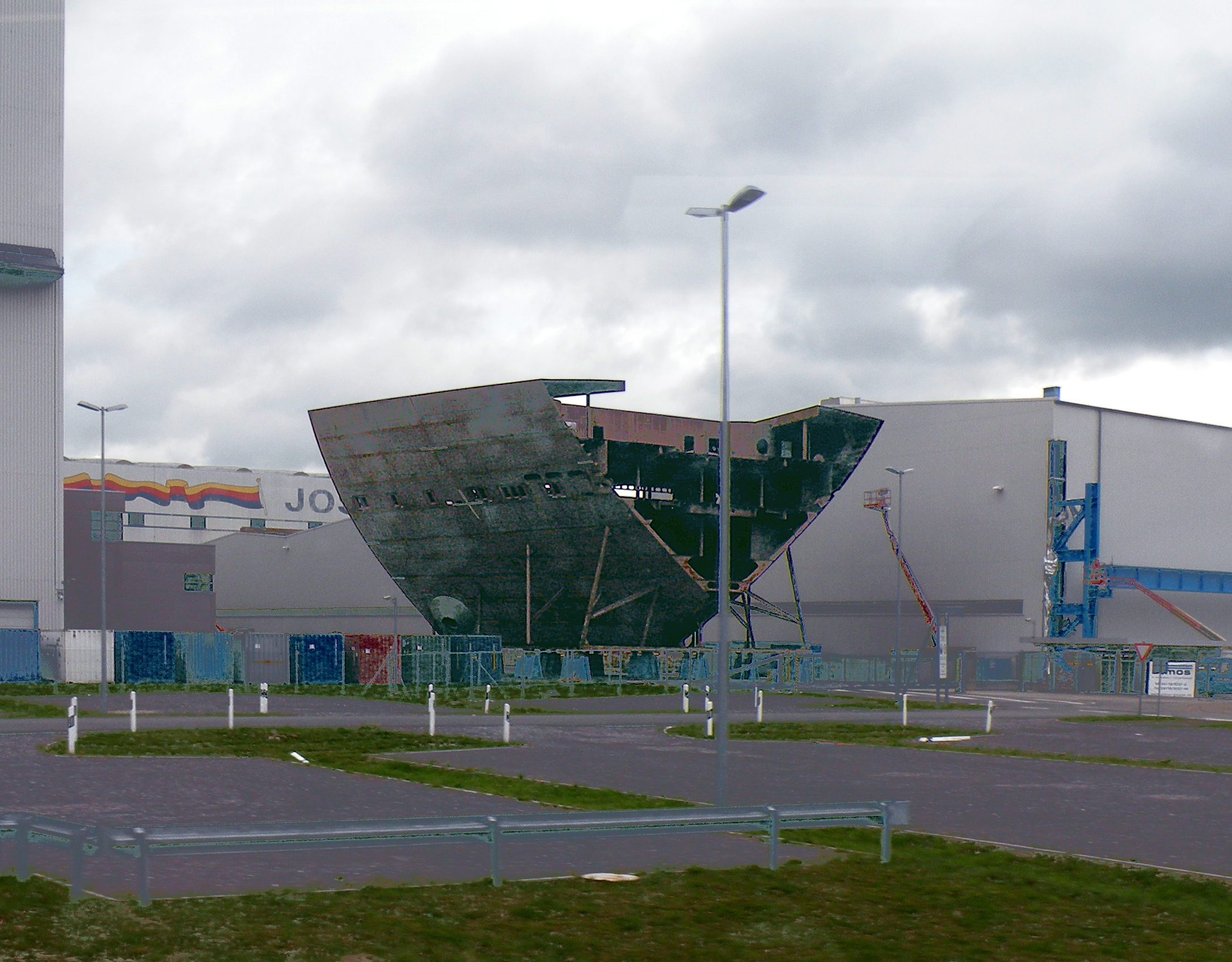 Секция корабельного корпуса.